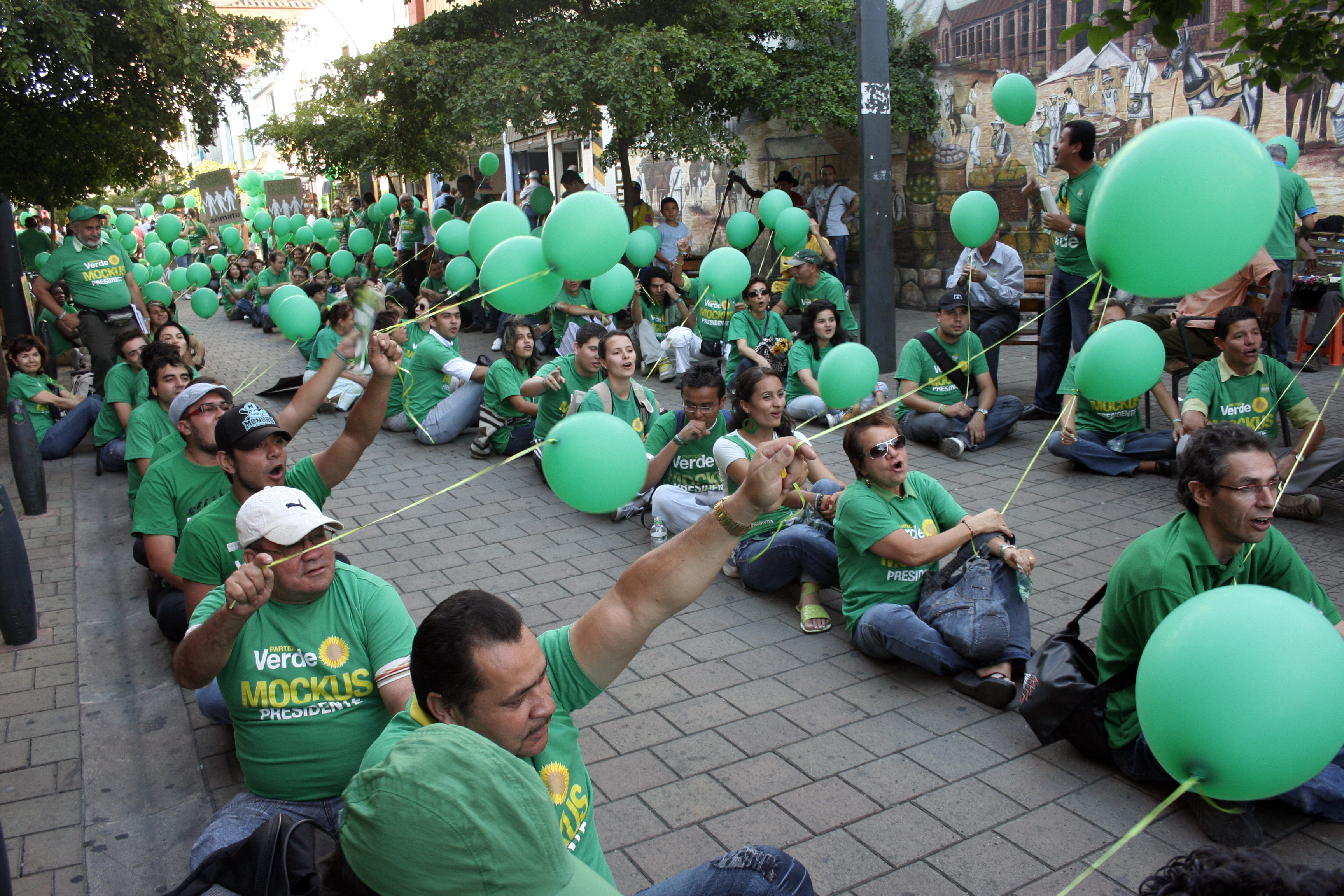 Celebracion del dia de la Tierra por campaña presidencial de Antanas Mockus en la carrera Carabobo en el centro de la ciudad de Medellin.